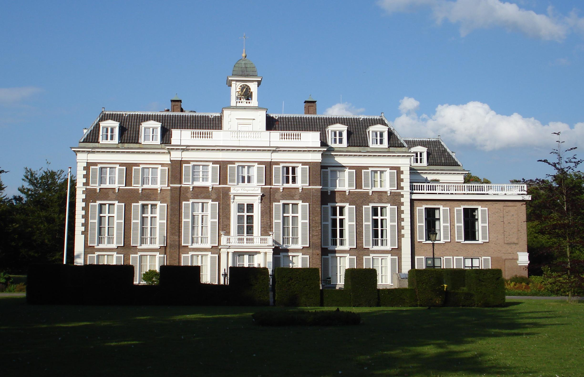 Den Haag. Villa Clingendael.